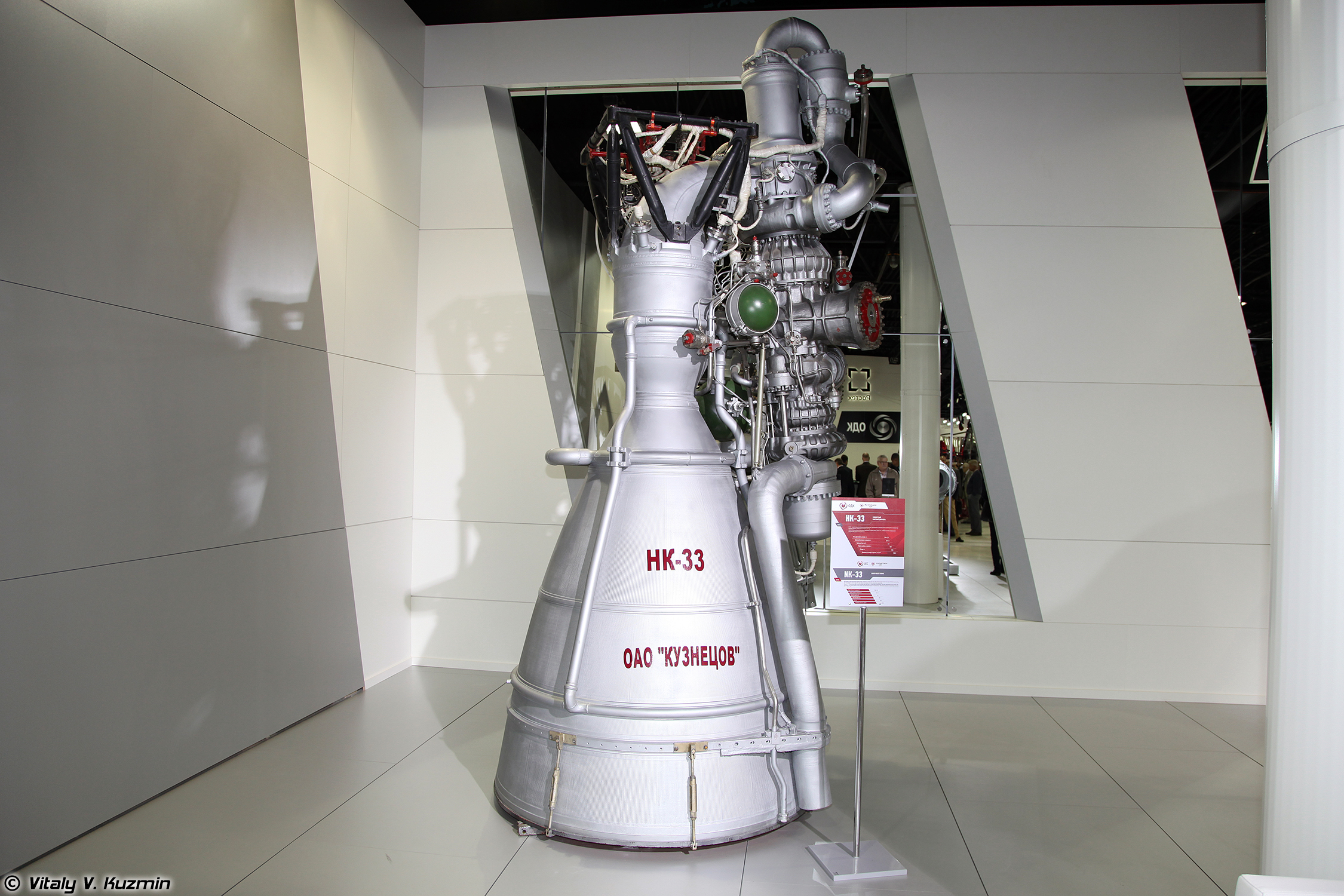 Жидкостный ракетный двигатель НК-33 (NK-33 rocket engine)